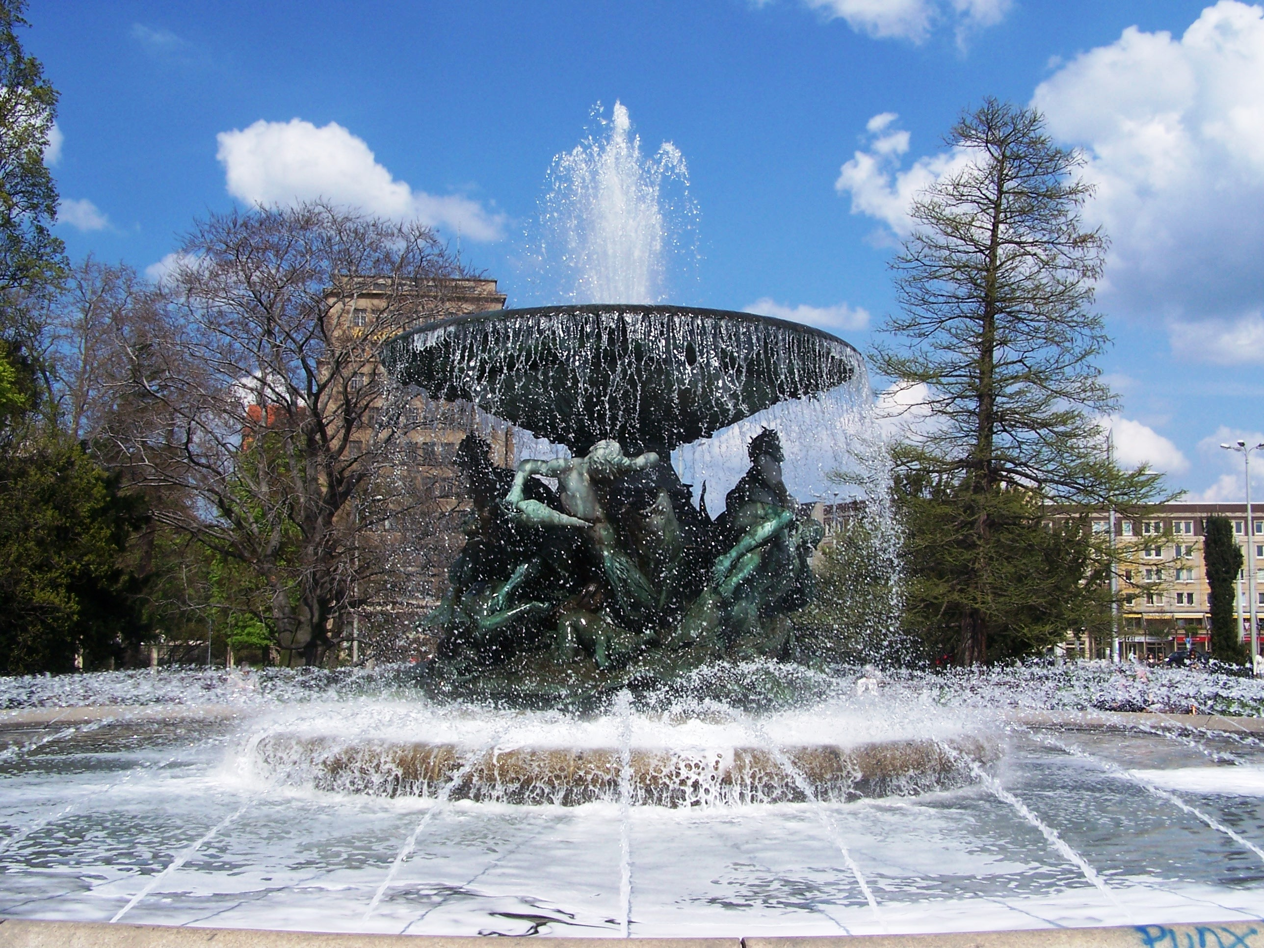 Brunnen „Stürmische Wogen“ auf dem Albertplatz in Dresden, geschaffen 1883–1894 von Robert Diez